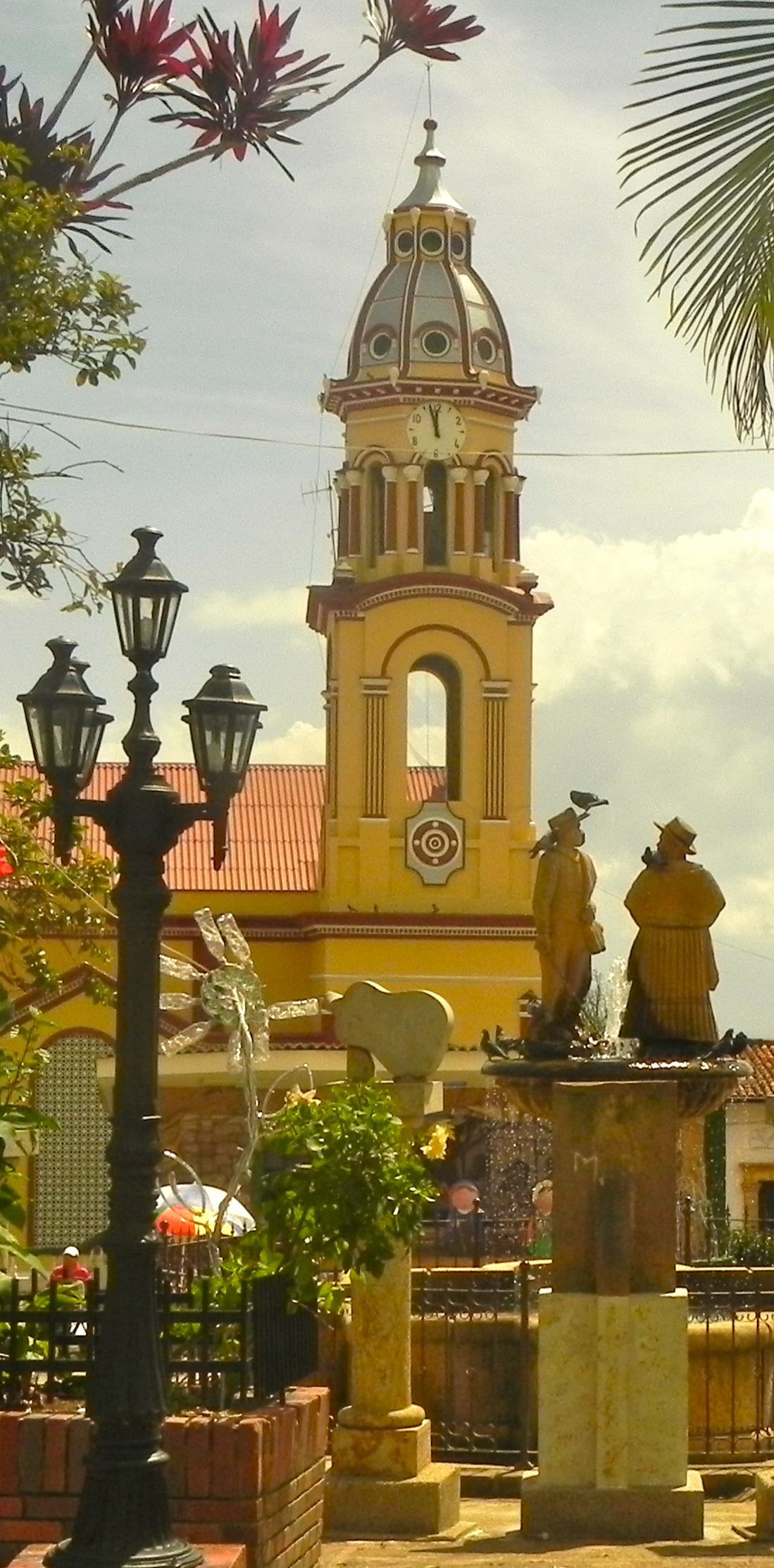 Homenaje al campesino y en el fondo la catedral